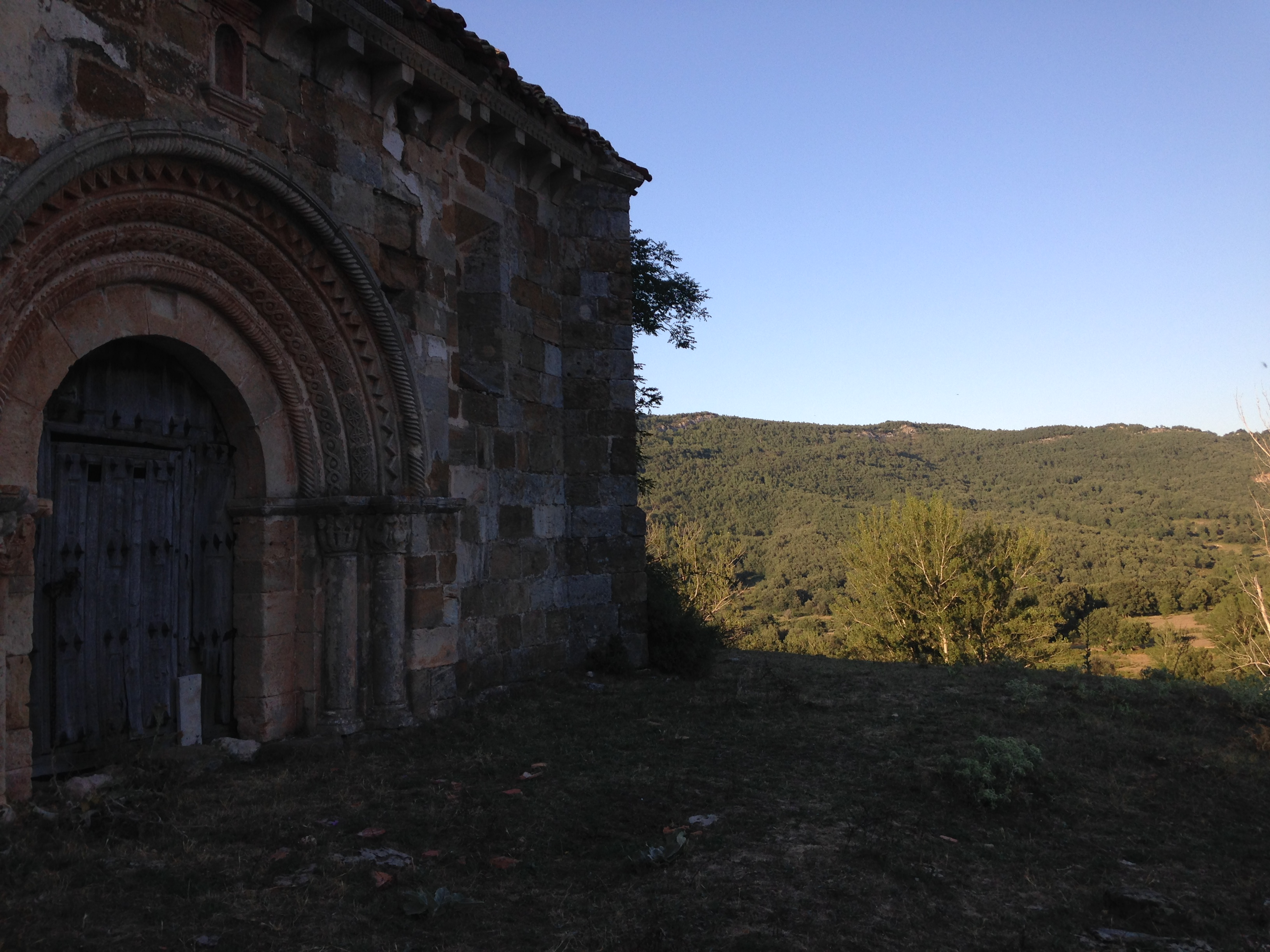 Iglesia románica de San Clemente, en Huidobro, Parque natural de Hoces del Alto Ebro y Rudrón (Burgos). 2015.